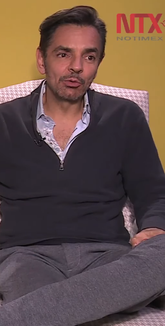 Salma Hayek y Eugenio Derbez buscan reivindicar imagen de latinos con "Cómo ser un Latin Lover"